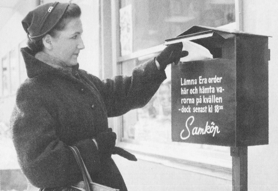 Samköp-Bandets låda i Bandhagen